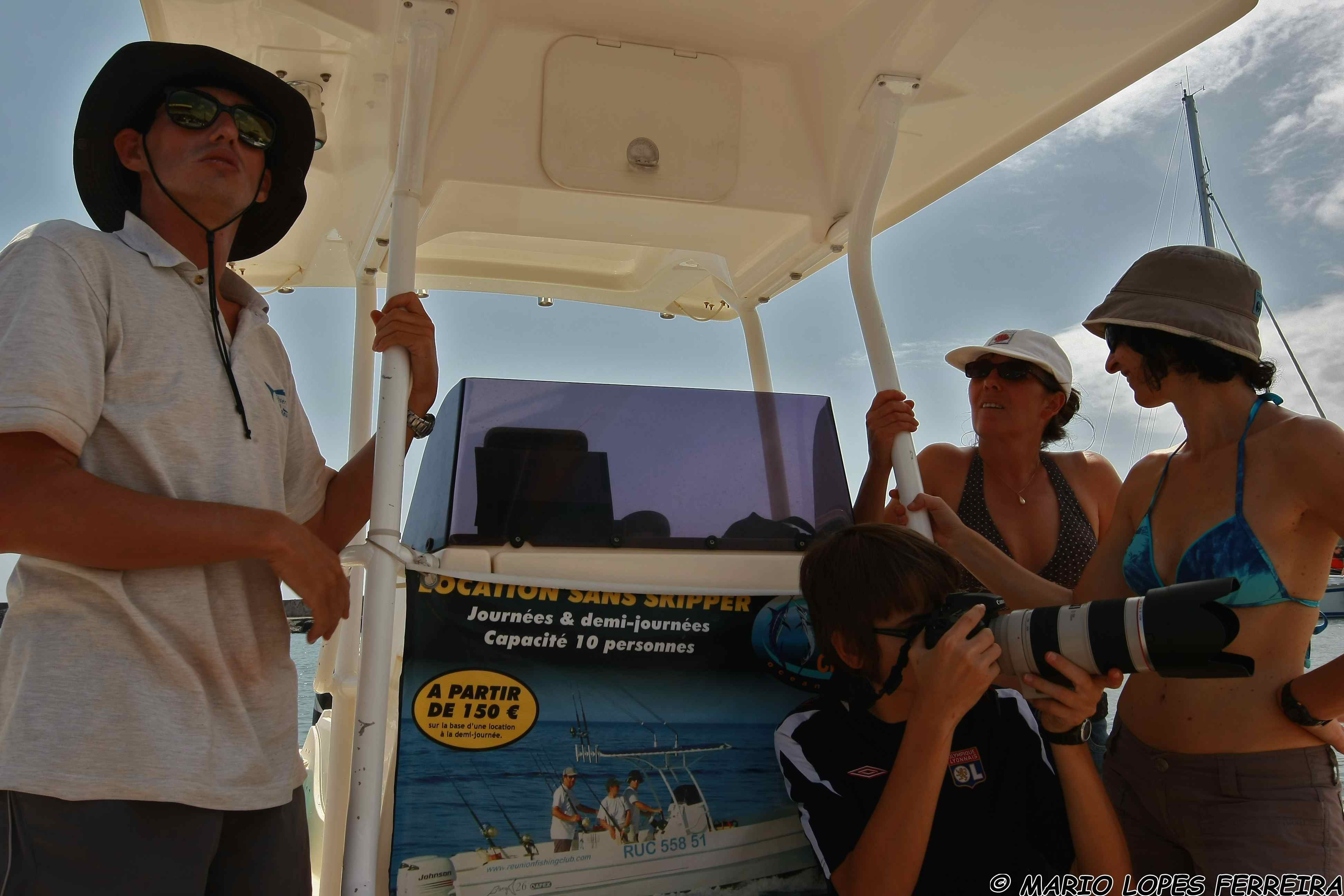 Sortie en mer dans la baie de St Gilles accompagnée du président de l'OMAR, Michaël Rard. Il donne les bons conseils avant de partir.